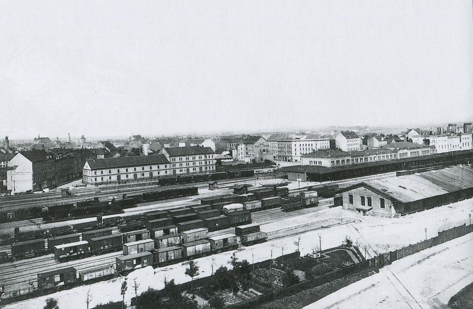 Alter Görlitzer Bahnhof nach der Erweiterung von 1869. Im Hintergrund der Packhof und die Zufahrt zur Berliner Straße mit dem Hotel Vier Jahreszeiten (Berliner Straße Ecke Bahnhofstraße).